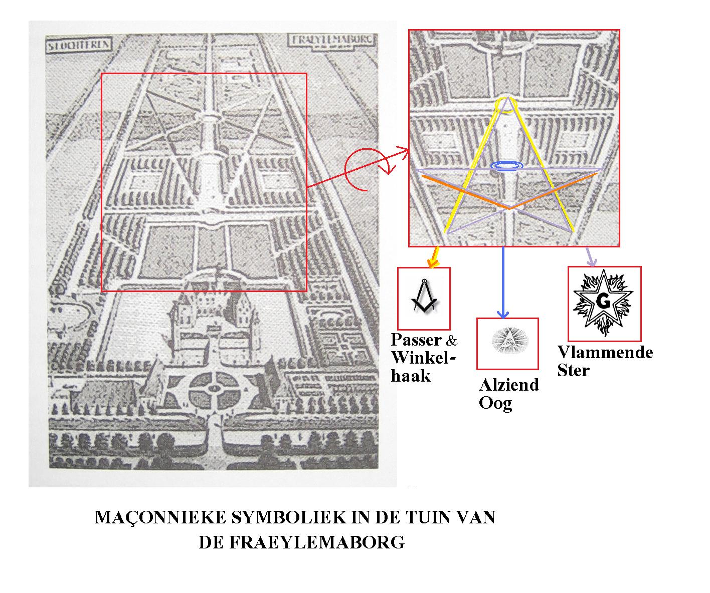 Masonic symbols in the garden of the Fraeylemaborg (NL)